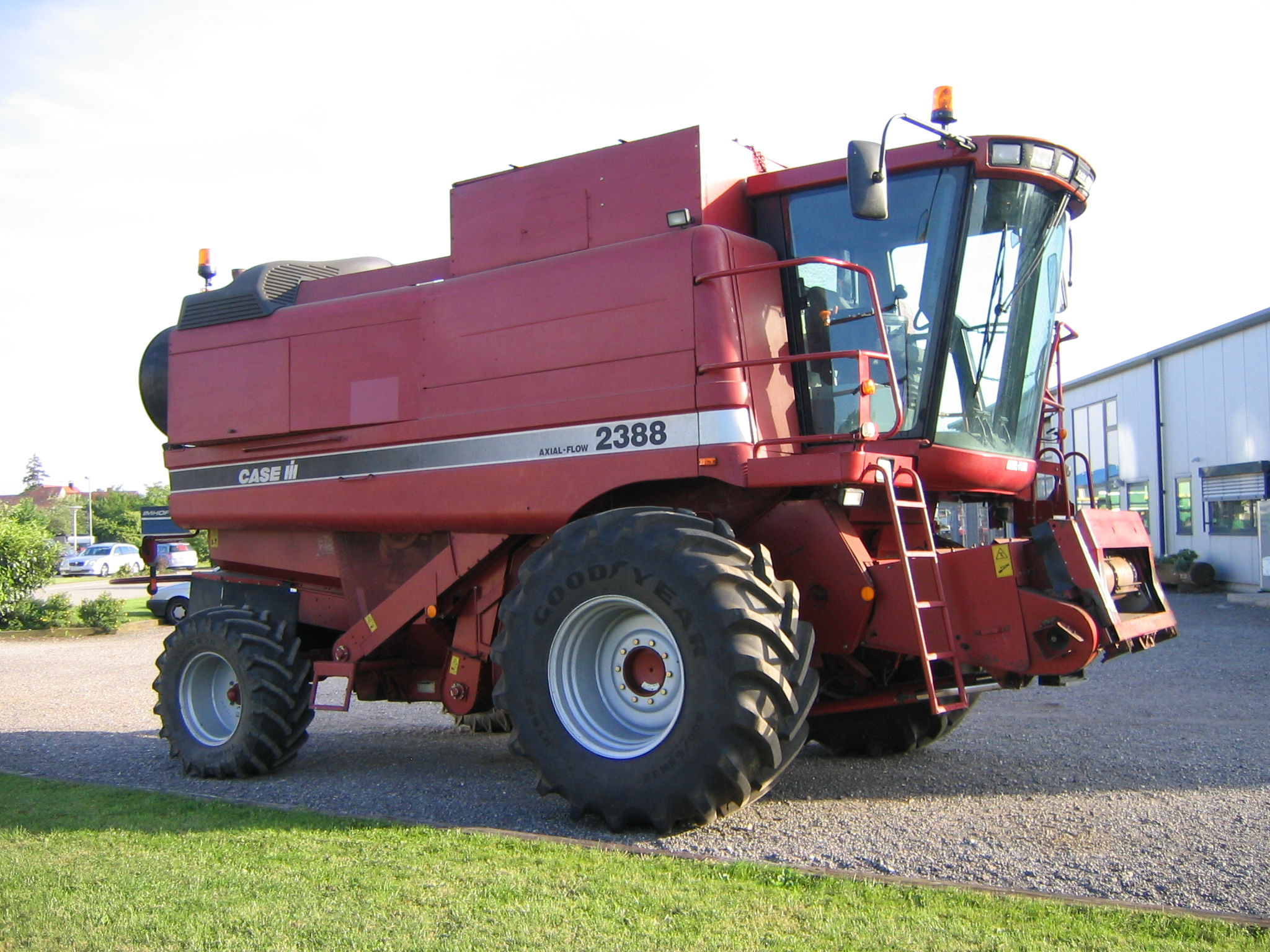 Case-IH-Mähdrescher 2388 Axial-Flow (ohne Schneidwerk), aufgenommen irgendwo zwischen Freiburg und Lahr